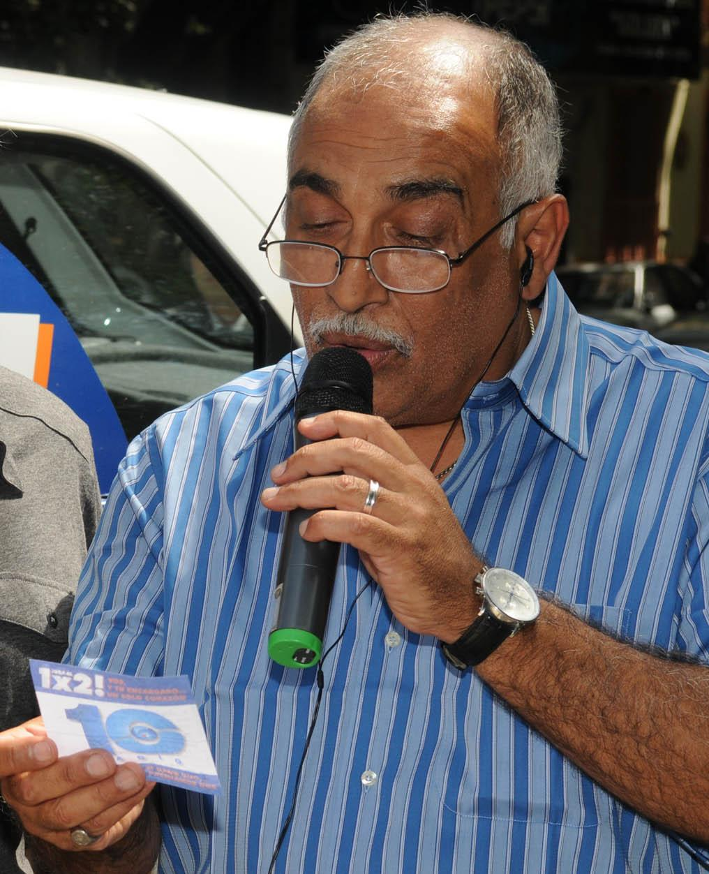 Víctor Santa María participó del sorteo de la promoción "1x2" en Radio 10, en la que el ganador del concurso se llevó un auto y regaló otro para su encargado de edificio. Sitio principal: Recortado Oscar González Oro